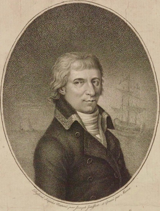 André-Joseph Mécou (um 1774–1838) nach Joseph Jauffret (1781–1836): Der französische Seefahrer und Expeditionsleiter Nicolas Baudin (1754–1803). 14 x 19,7 cm. Bibliothèque nationale de France, Paris. Vorbild für die Stiche von Westermayer, Bonneville, Lefèvre und Boulenaz. (Anne Lombard-Jourdan: Les deux portraits de Nicolas Baudin. In: Archipel (Paris) 62/2001, S. 65–70.)